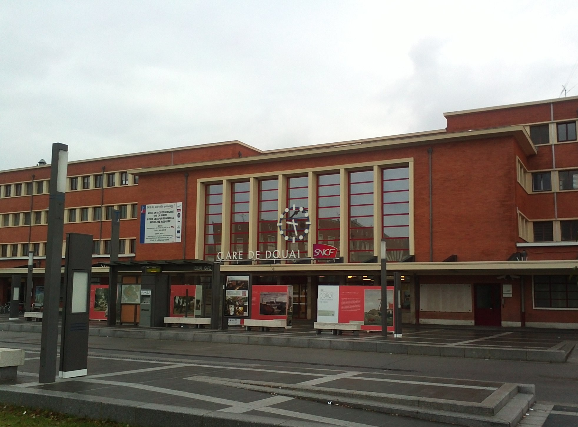 Gare de Douai-2013